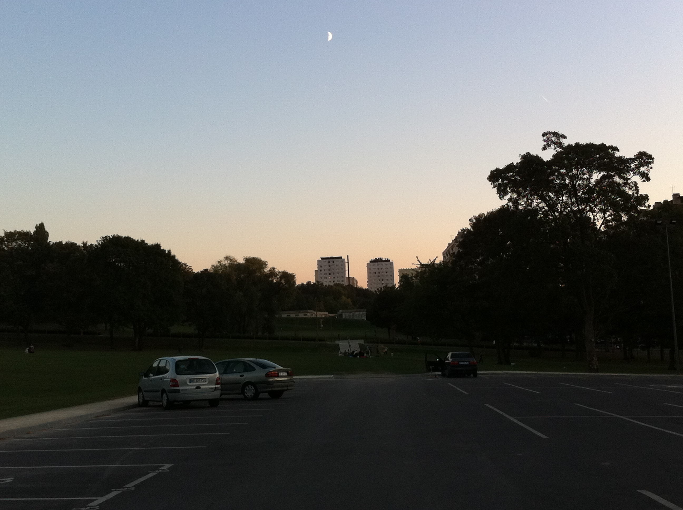 Prise le 03 octobre 2011.